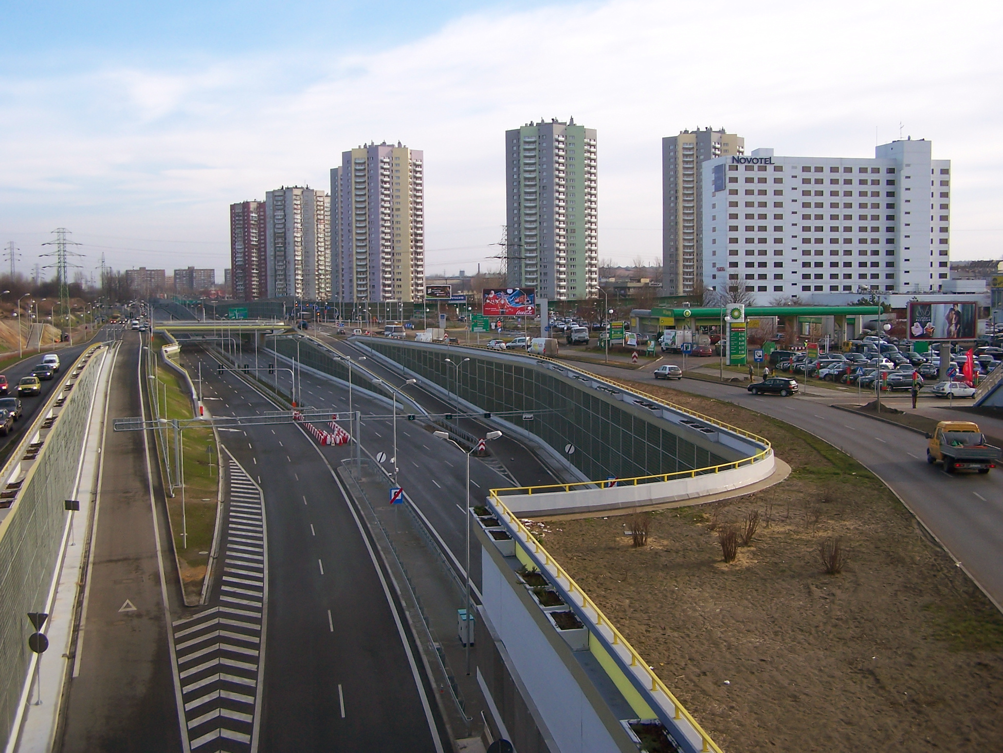 Ul. W. Rodździeńskiego w Katowicach w miejscu wyjazdu z tunelu przebiegającego pod Rondem. Widok w kierunku Sosnowca. Po prawej osiedle "Gwiazdy" i hotel "Novotel".